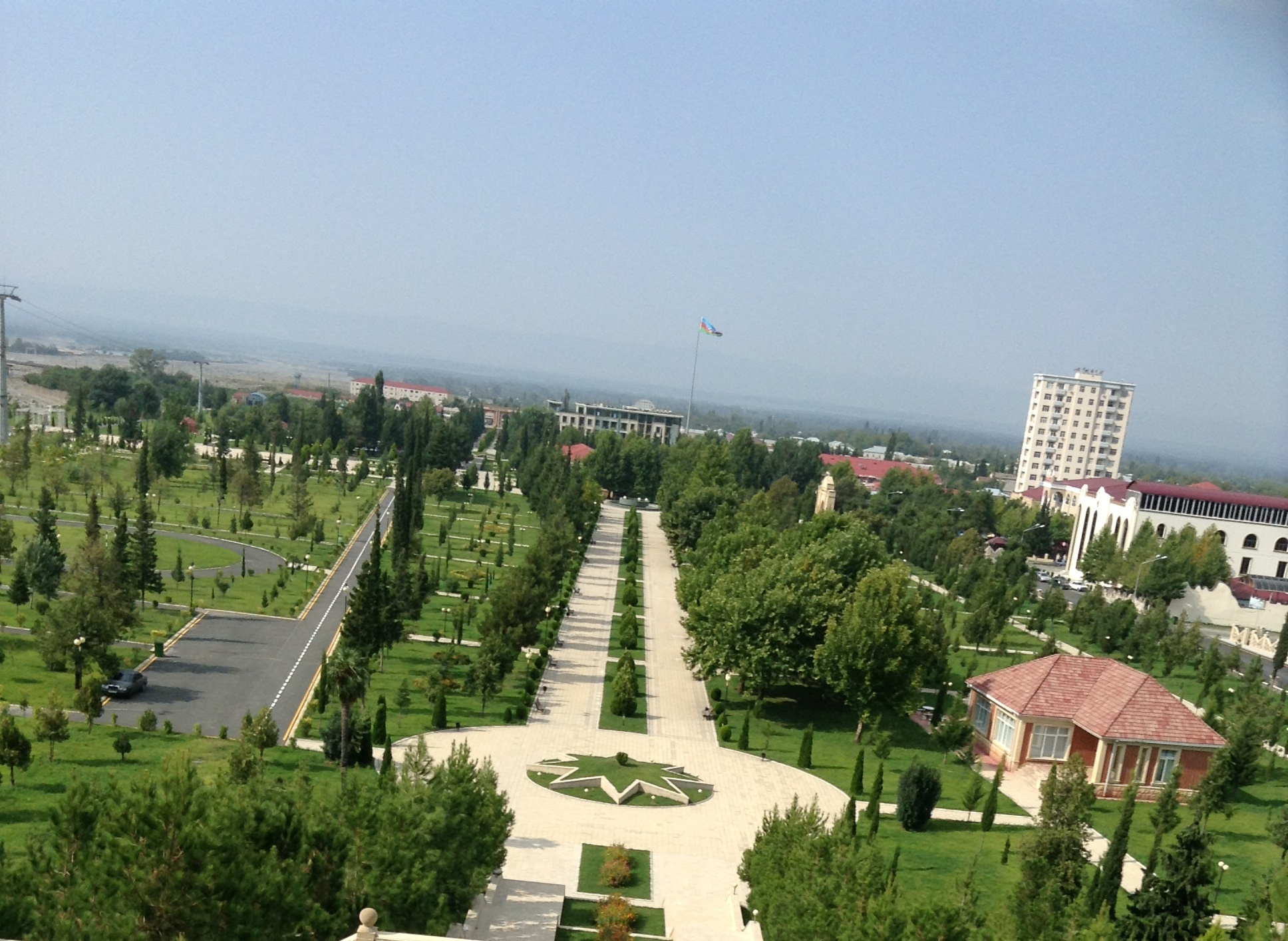 Mədəni landşaft